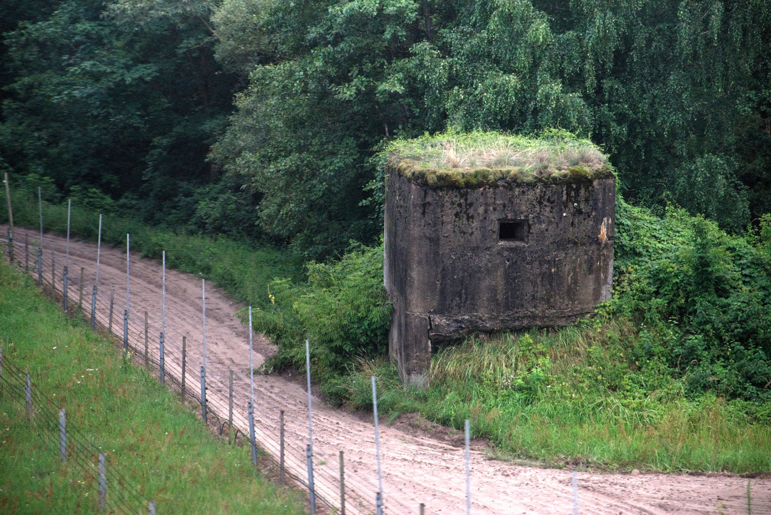 Пограничный дот над Западным Бугом у железнодорожного моста Брест-Тересполь